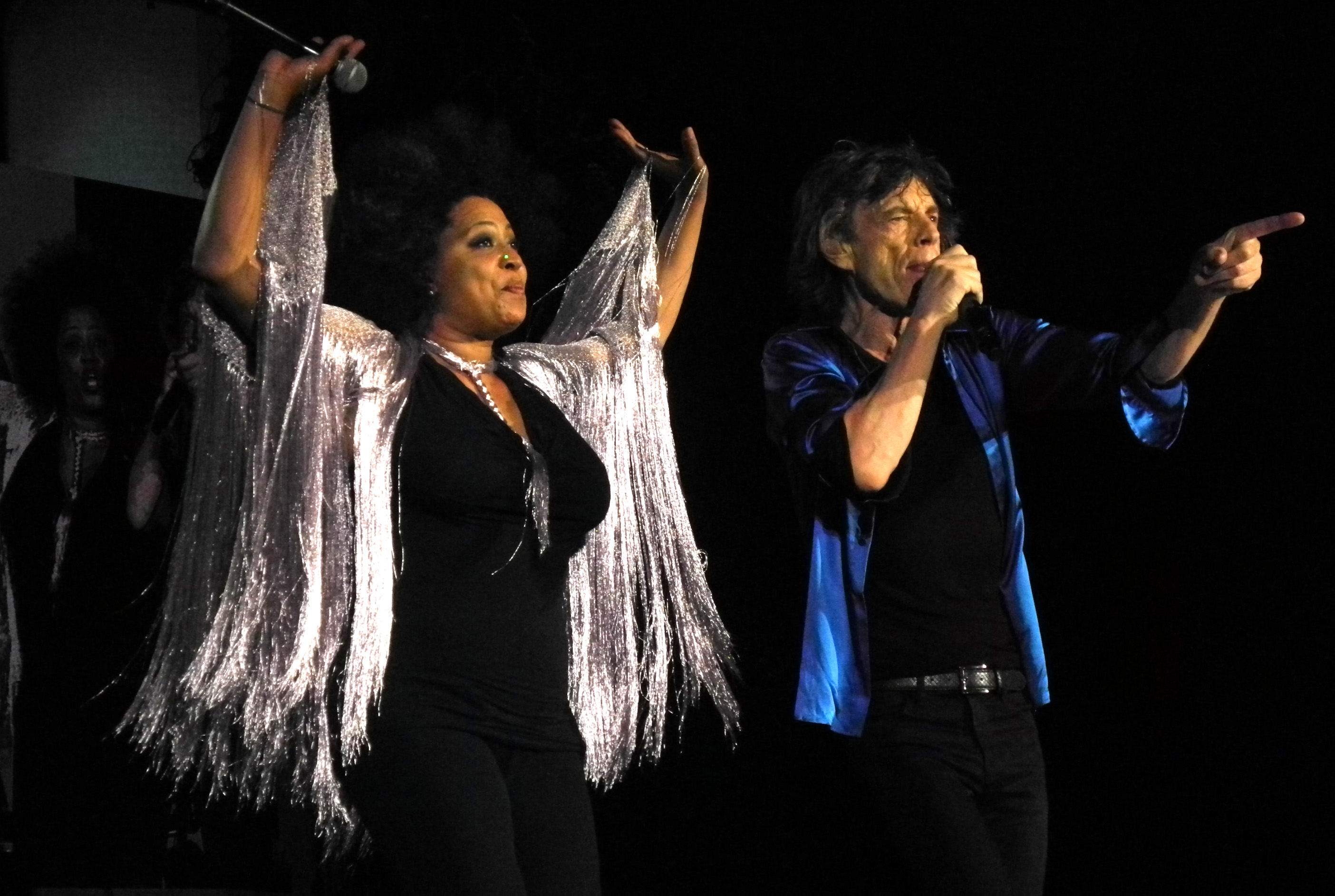 Concerto dei Rolling Stones ad Hyde Park per il tour '50 and counting...' del 2013, Mick Jagger